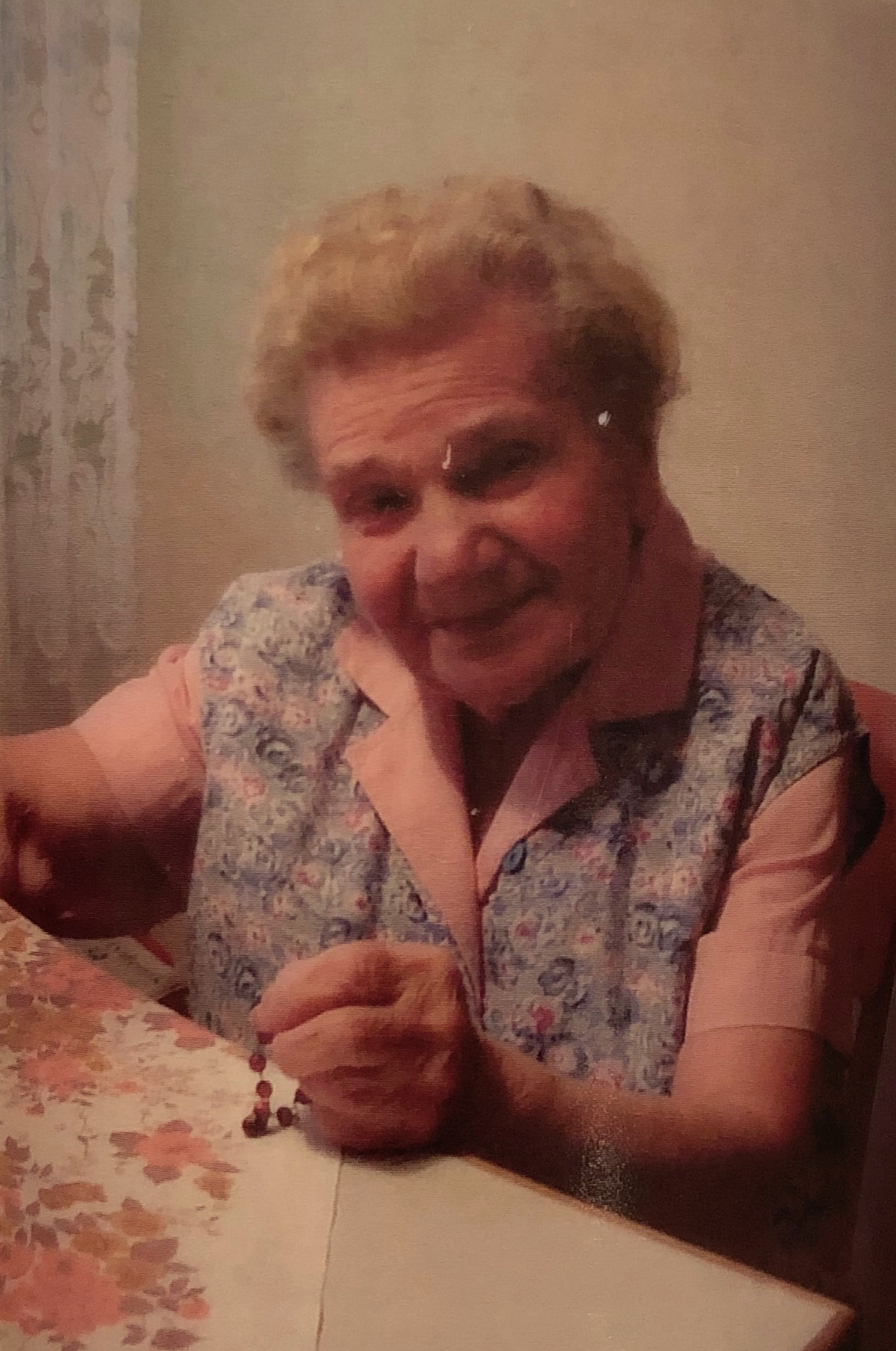 Marie Kupiecová, kostelnice v Lovosicích v 70.-80. letech 20. století